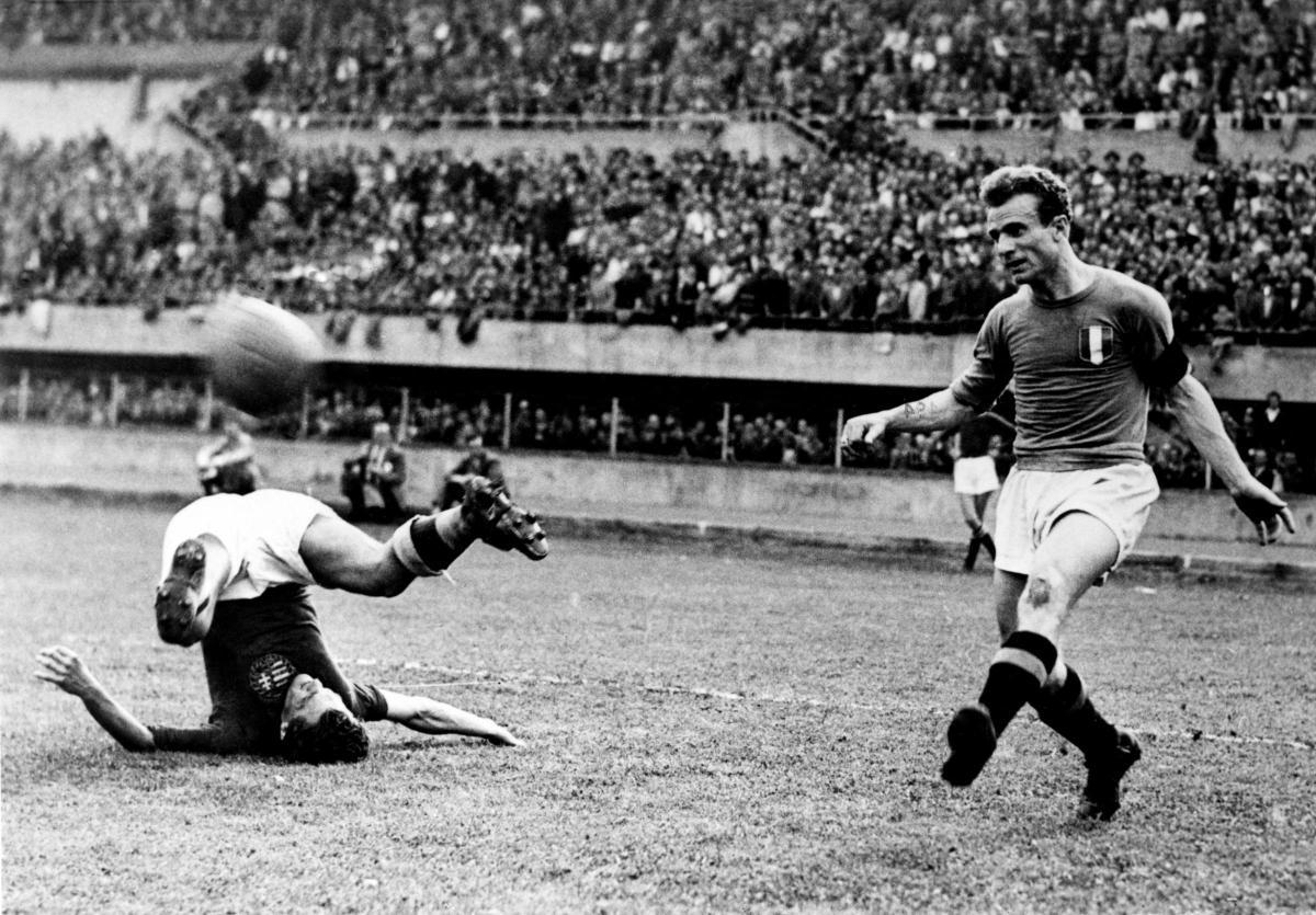 Torino, stadio Comunale, 11 maggio 1947. L'azzurro Valentino Mazzola (a destra) al tiro, dopo aver superato e messo a sedere un avversario magiaro (a destra), nel corso dell'amichevole tra Italia e Ungheria (3-2).